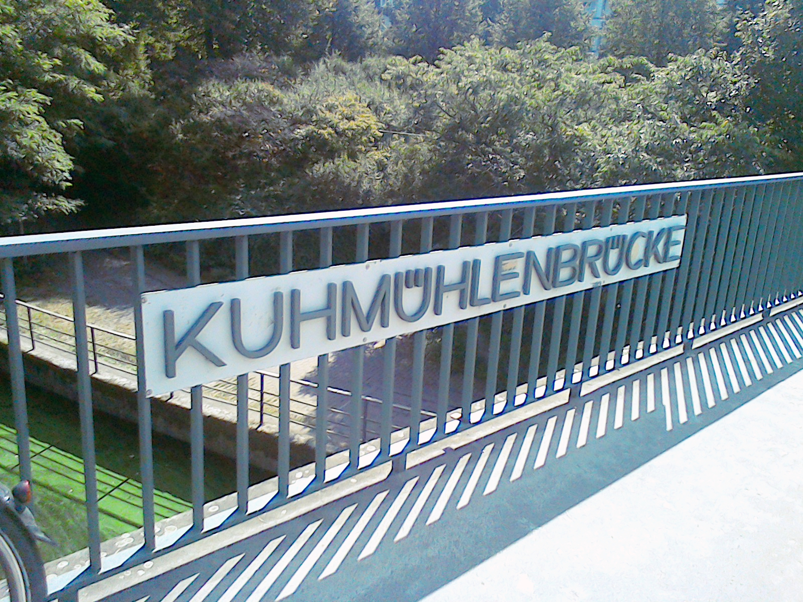 Die Kuhmühlenbrücke ist eine Straßenbrücke, eingetragen in der DL für Uhlenhorst. Erbaut zwischen 1965 und 1967 verbindet sie die Straße Kuhmüle mit der Schürbeker Straße und führt über den Mundsburger Kanal zur Westseite und den Kuhmühlenteich zur Ostseite.This is a photograph of an architectural monument.